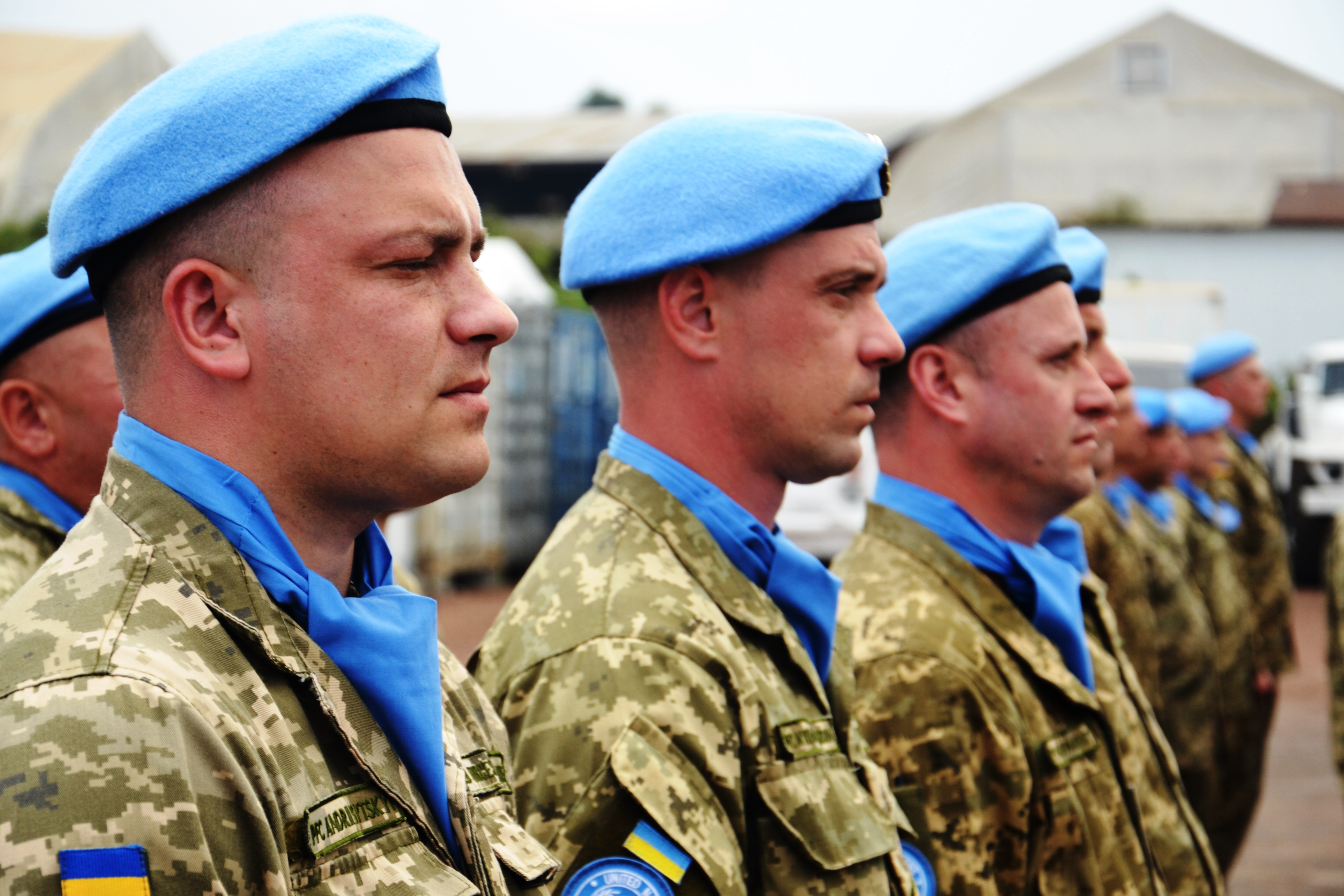 Ukrainian aviation unit. DR Congo. MONUSCO Помічник командира 18 ОВЗ по зв’язкам зі ЗМІ Віктор Ануфрієв, ДР Конго